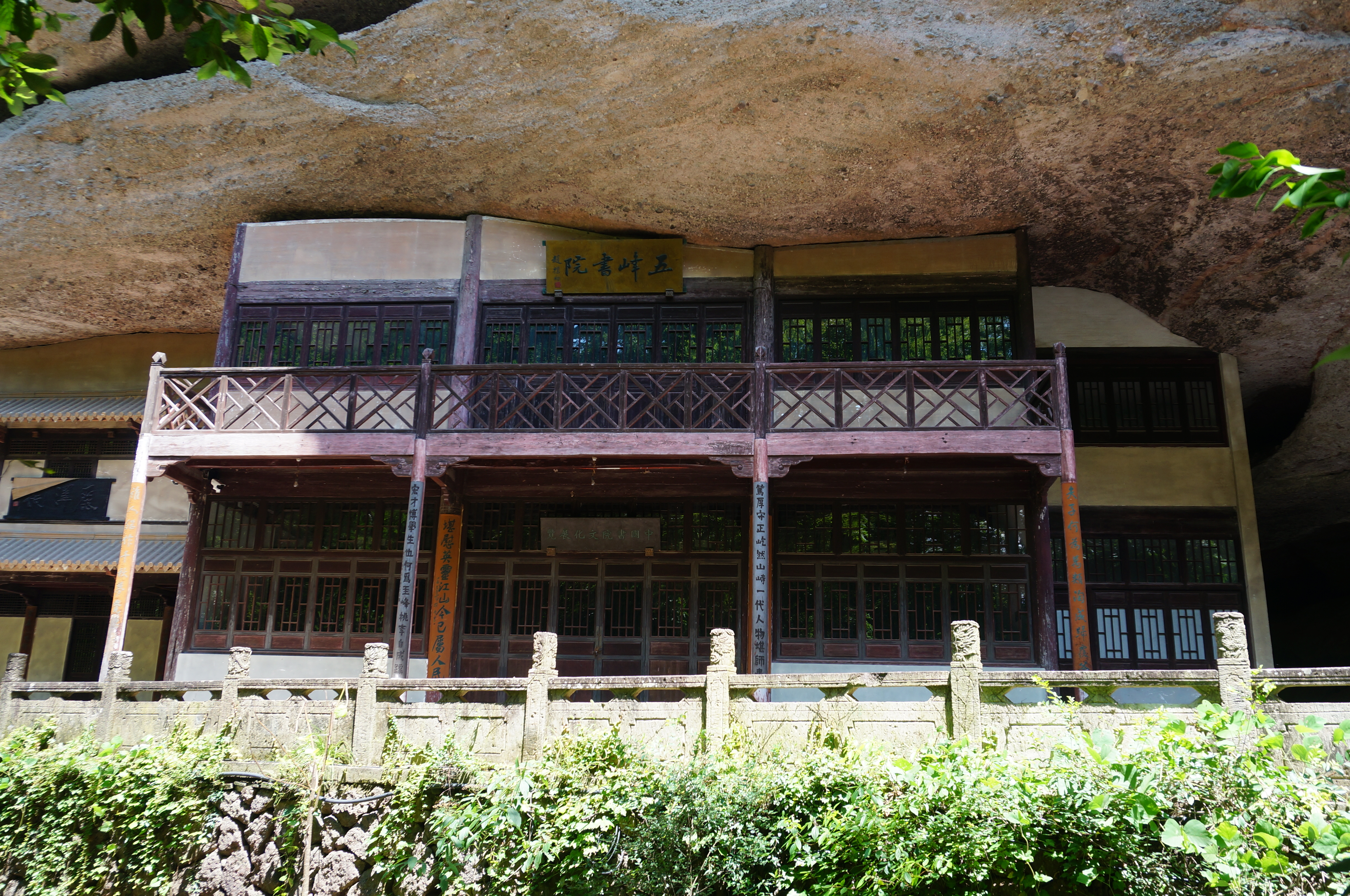 永康五峰书院，南面。